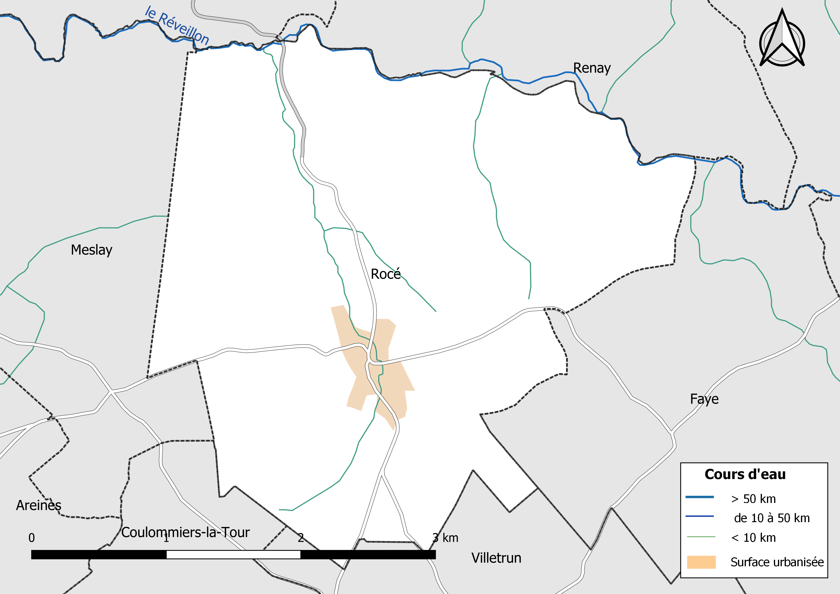 Carte du réseau hydrographique de la commune de Rocé (Loir-et-Cher) (France).